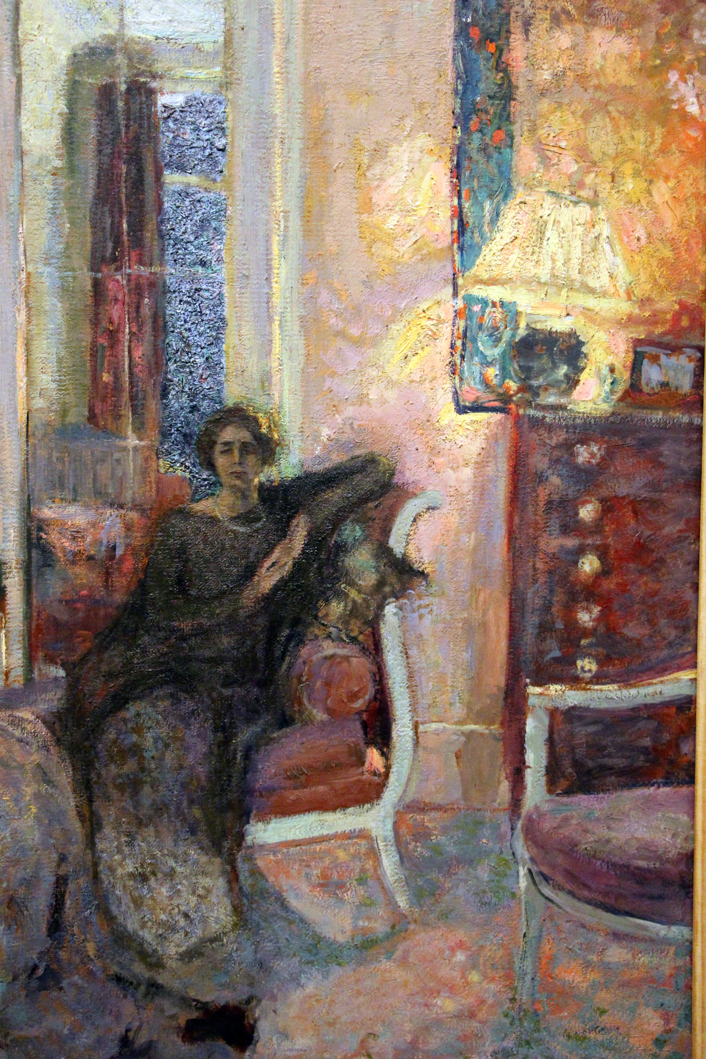 Museu de Arte de São Paulo